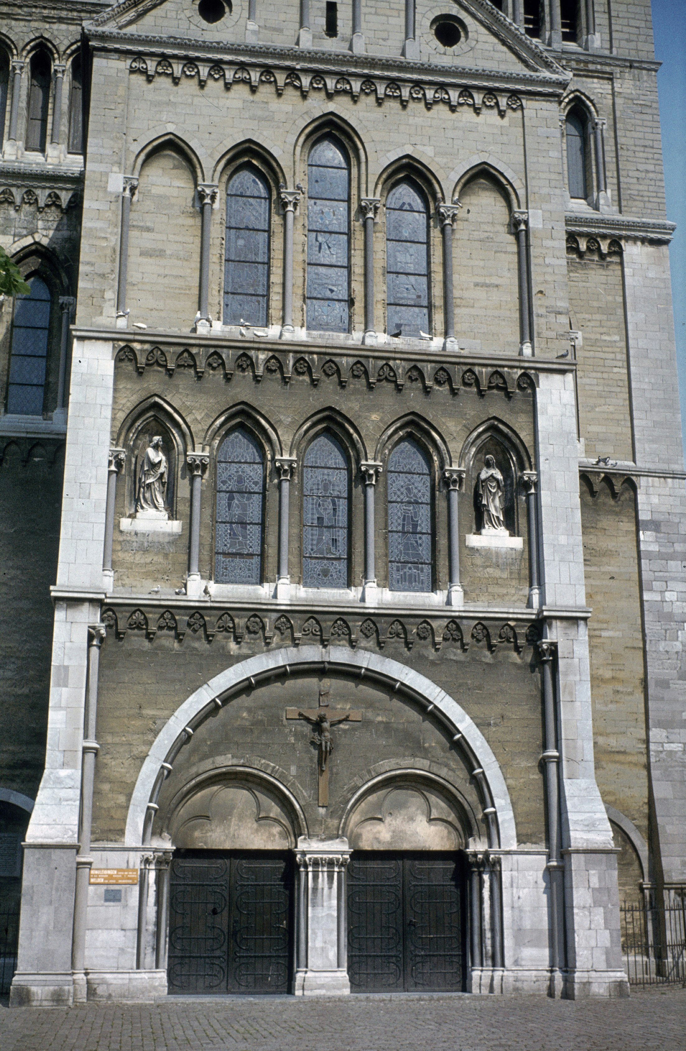 Munsterkerk Of Onze Lieve Vrouwe Kerk: Exterieur OVERZICHT west-noord-west